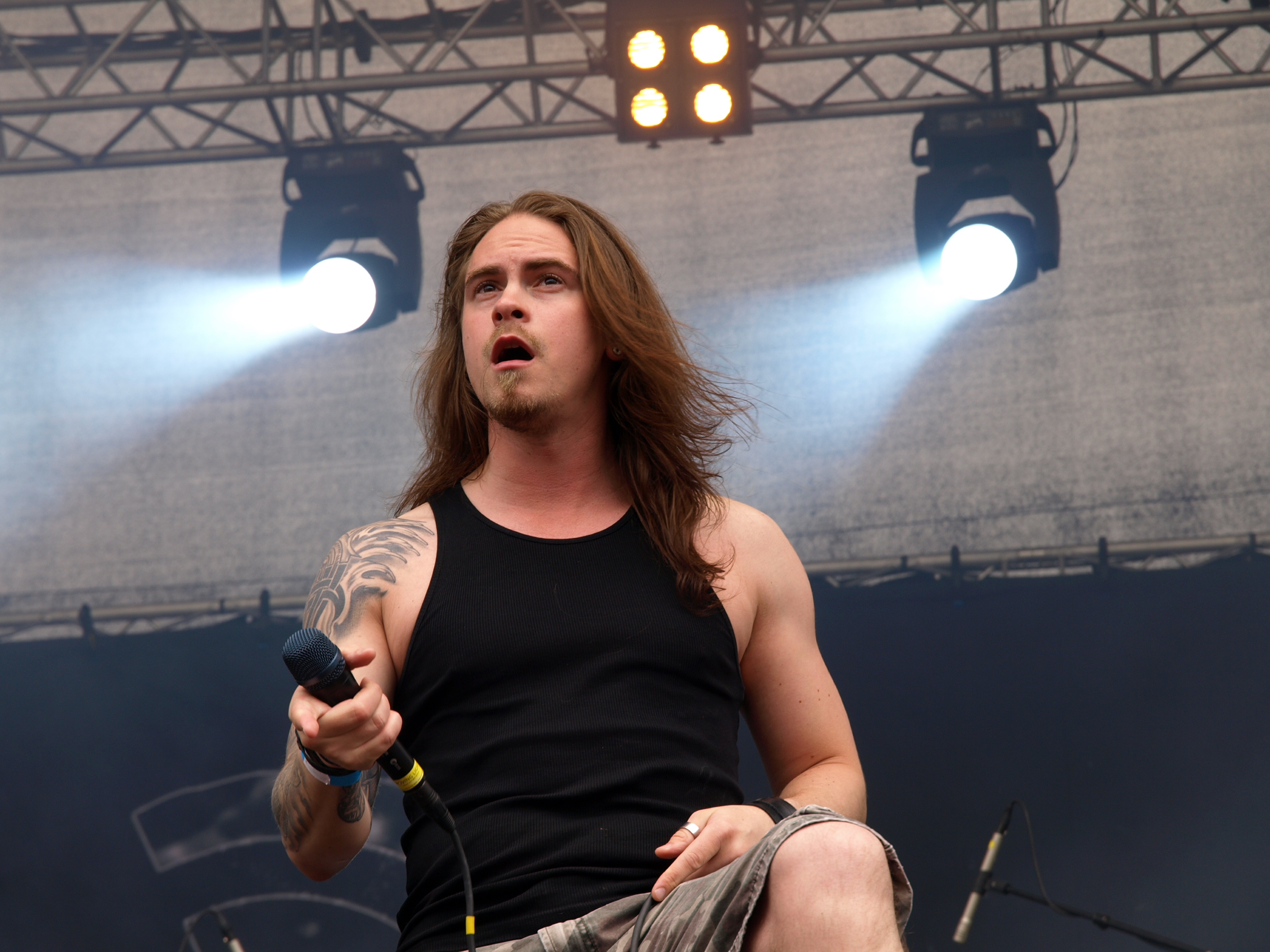 myGRAIN live am Myötätuulirock 2011